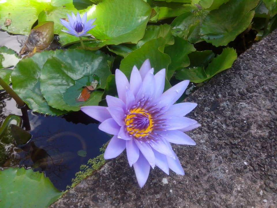 Lotus bleu (Nymphaea caerulea) au jardin botanique de Balata. Fort de France -Martinique